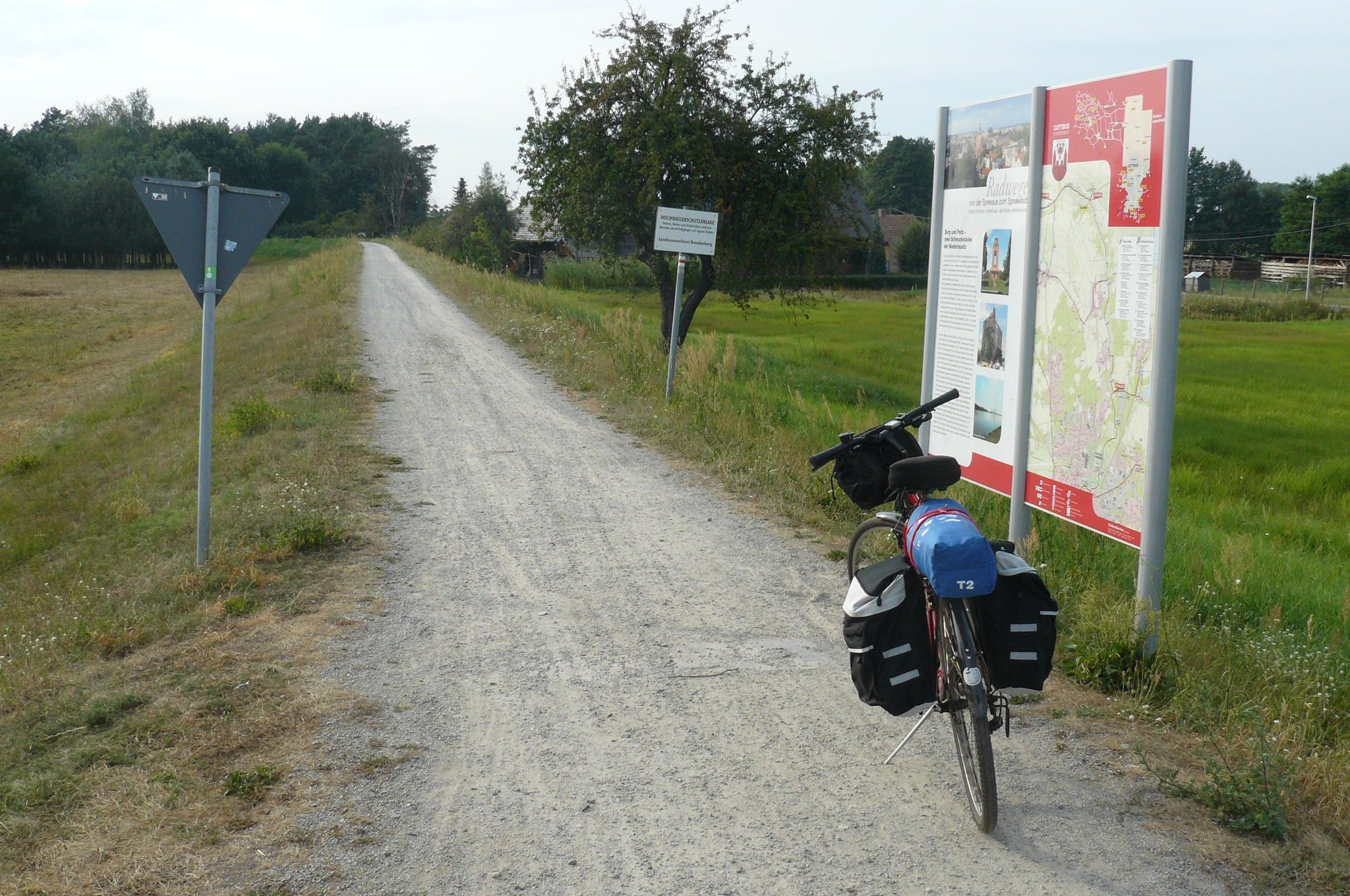 Gurkenradweg. Szlak ogórkowy, Spreewald.